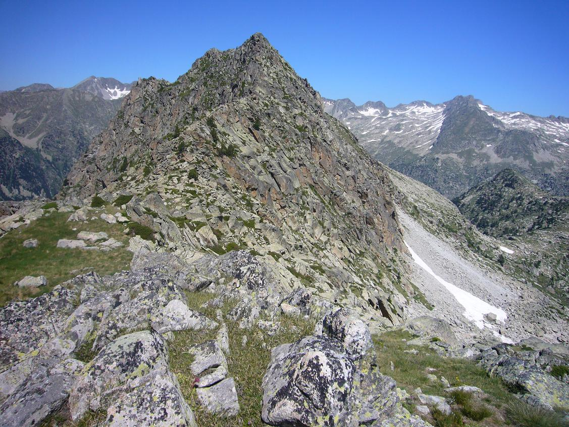 Pic de la Montanyeta, vist des del sud-est; dels tres, és el del mig; la Vall de Boí, Alta Ribagorça, Catalunya.